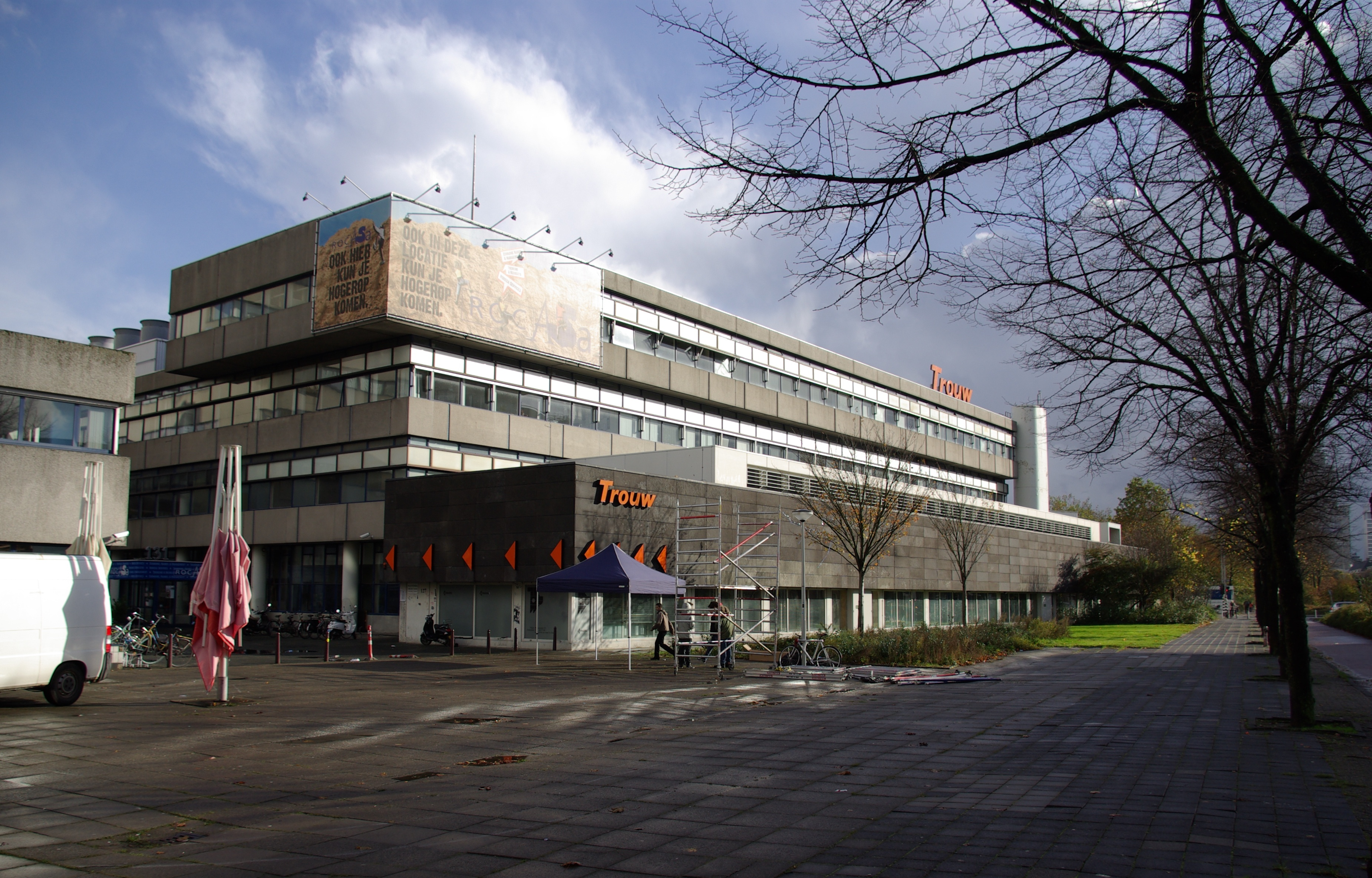 Ehemalige Verlagsgebäude der Zeitung Trouw in Amsterdam